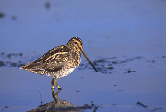 Gallinago gallinago